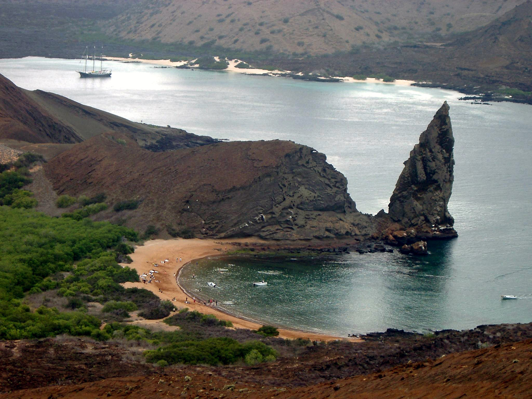 BaltolomeIs.JPG